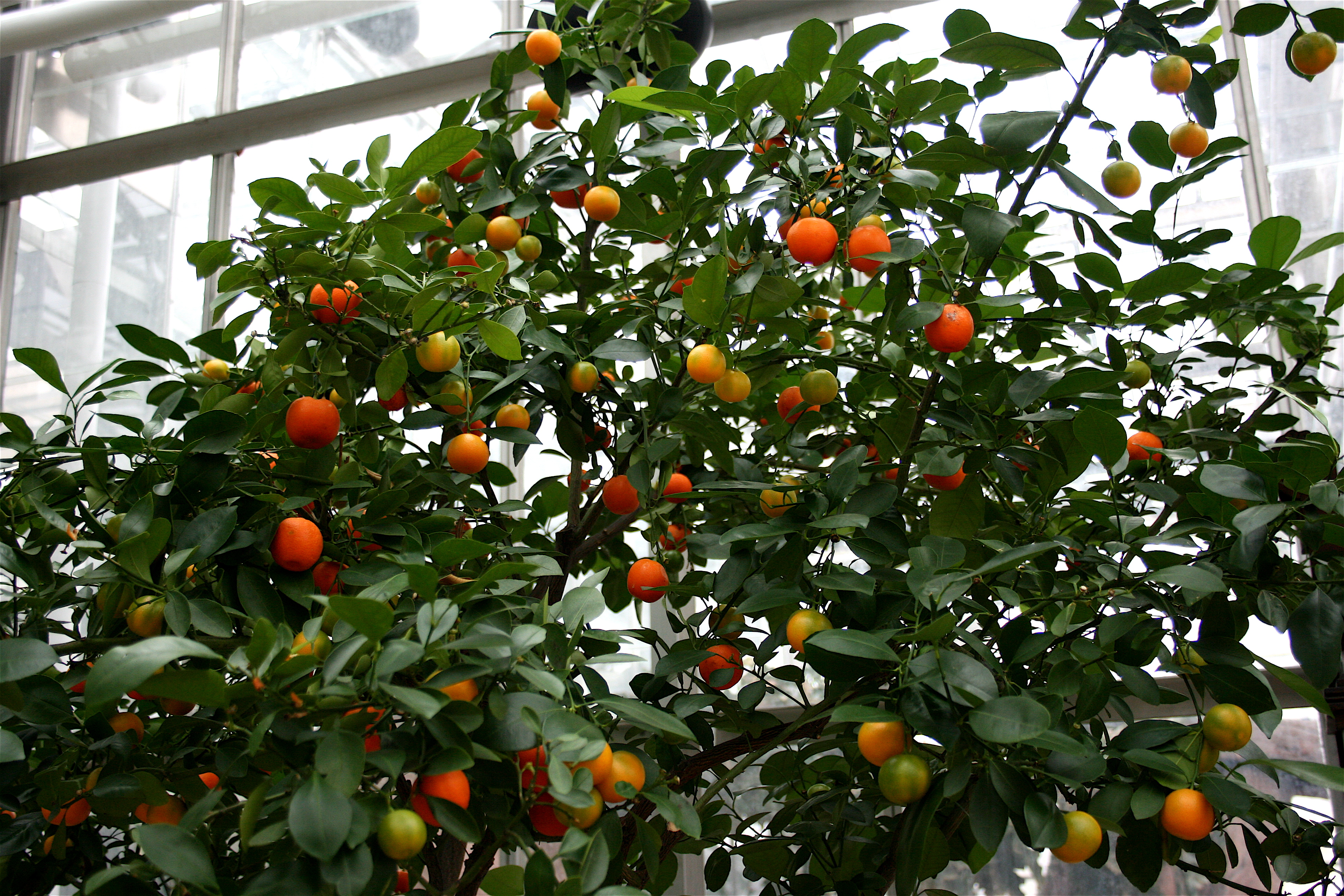 Musk Lime (X Citrofortunella mitis) at Frederik Meijer Gardens & Sculpture Park in Grand Rapids, MI